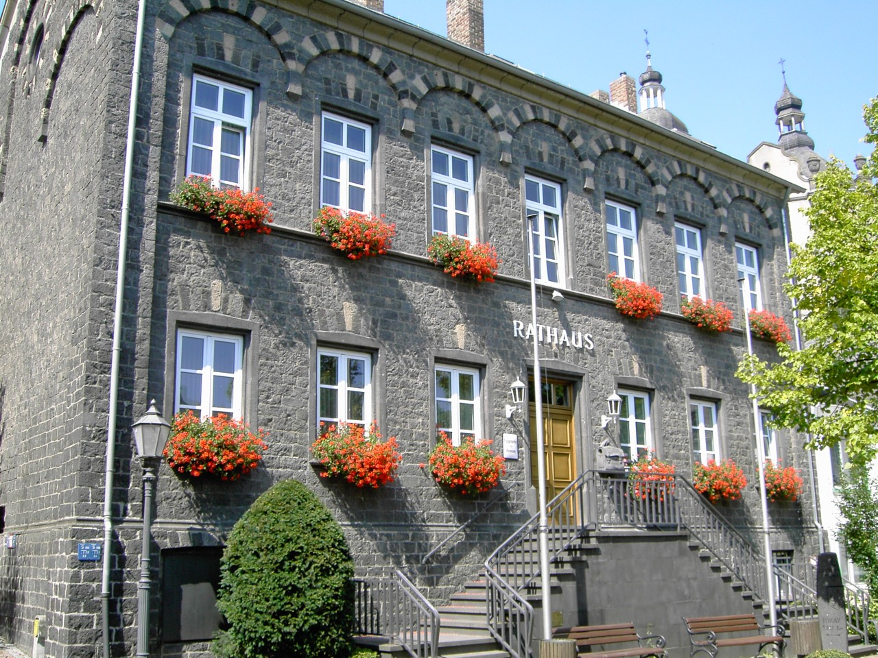 Rathaus der Gemeinde Kruft / selbst fotografiert / gemeinfrei